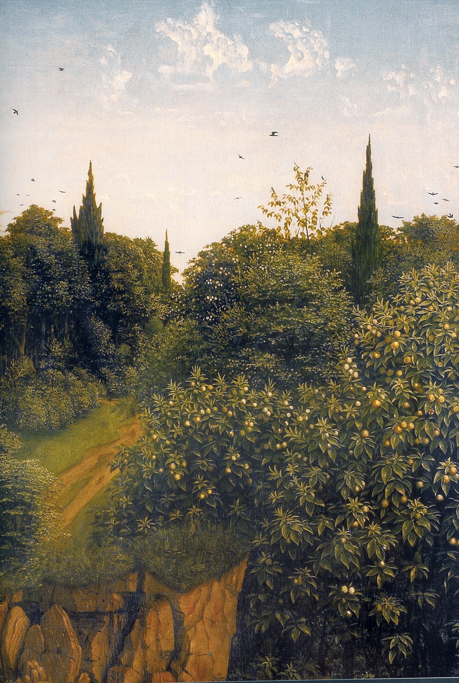 detail: nature